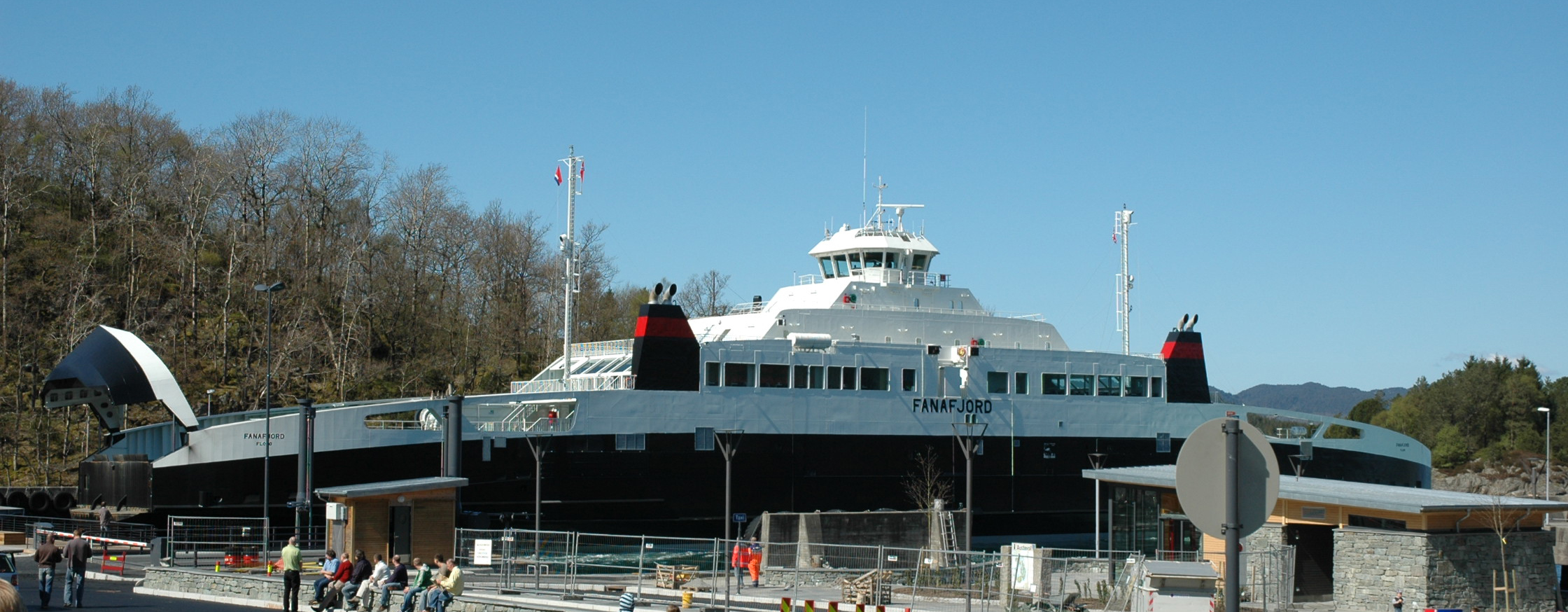 MF Fanafjord